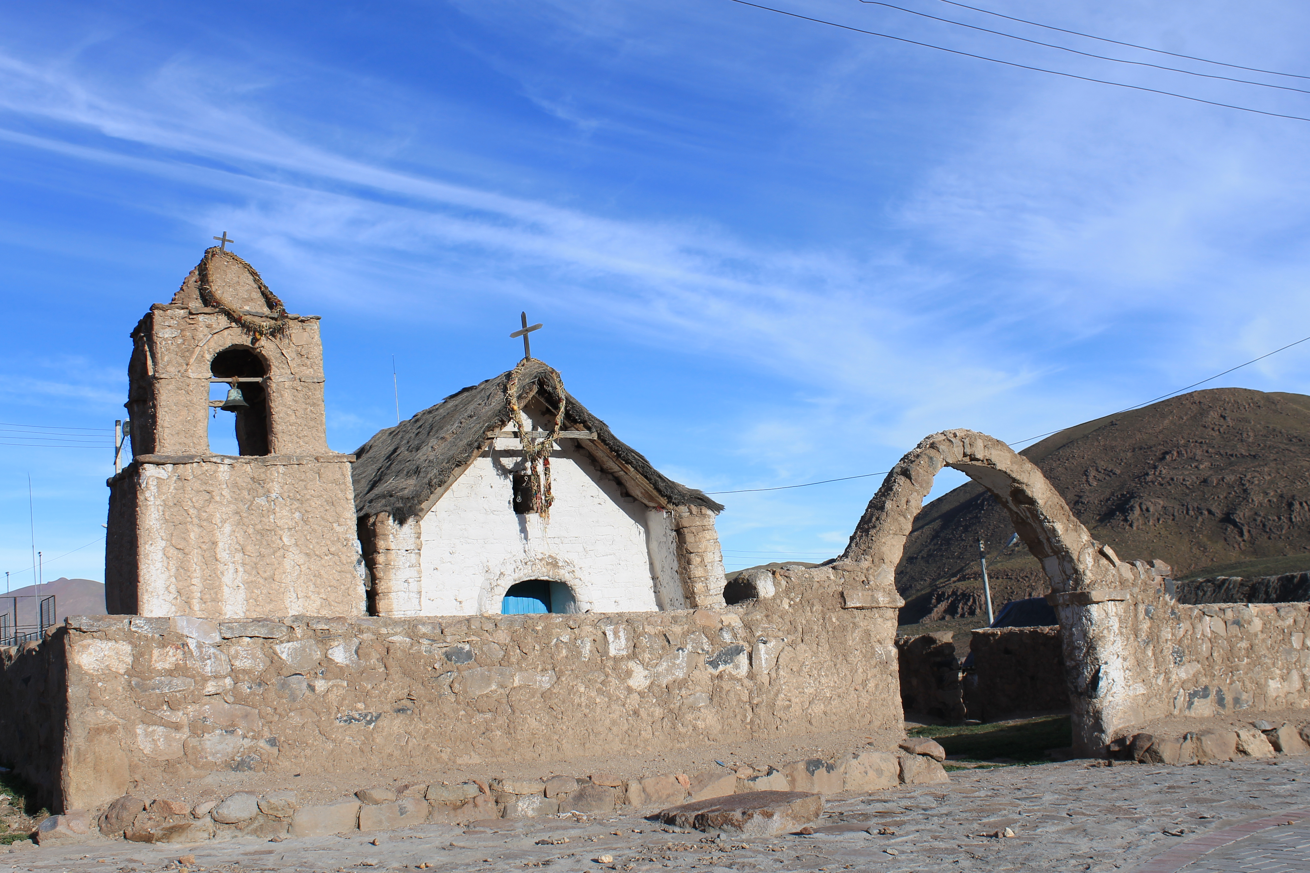 Iglesia de Parcohailla This is a photo of a national monument in Chile: 2060